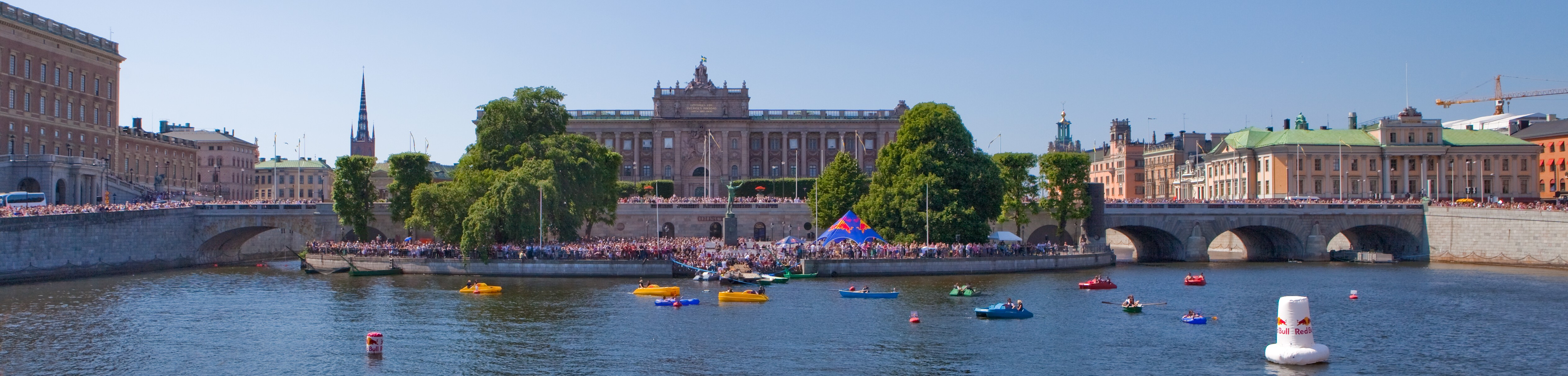 Norrbro, Strömparterren, Red Bull Flugtag 2010, Strömmen, Stockholm